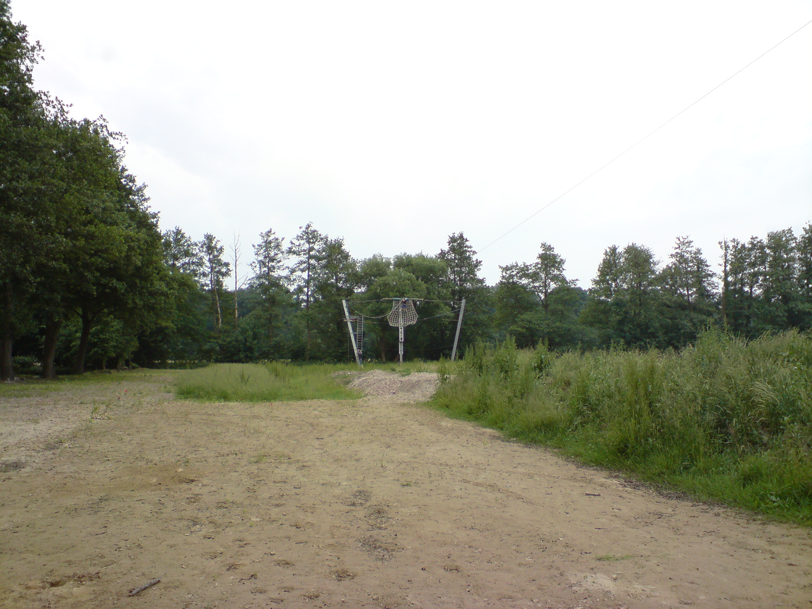 Kletterpark Kandel 3